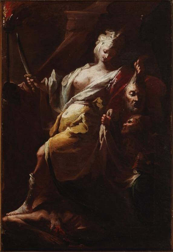 La obra representa a Judith sujetando la cabeza del general Holofernes, a quien había dado muerte mientras dormía.